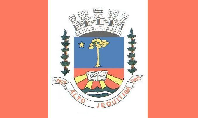 bandeira do município de Alto Jequitibá-MG